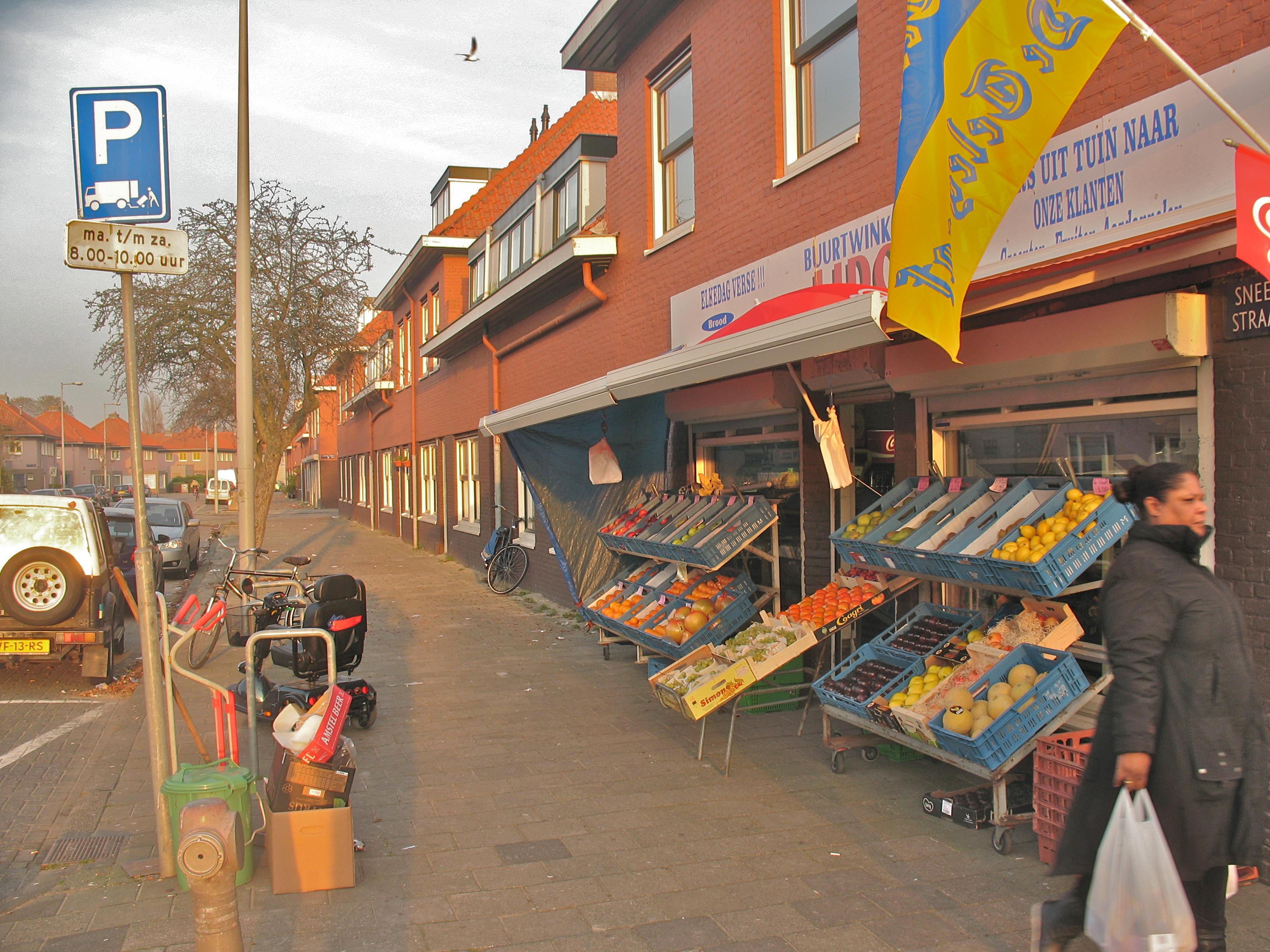 Woningen in de polder Buiksloterham, Amsterdam-Noord. Sneeuwbalstraat, buurtsuper hoek Fresiastraat.